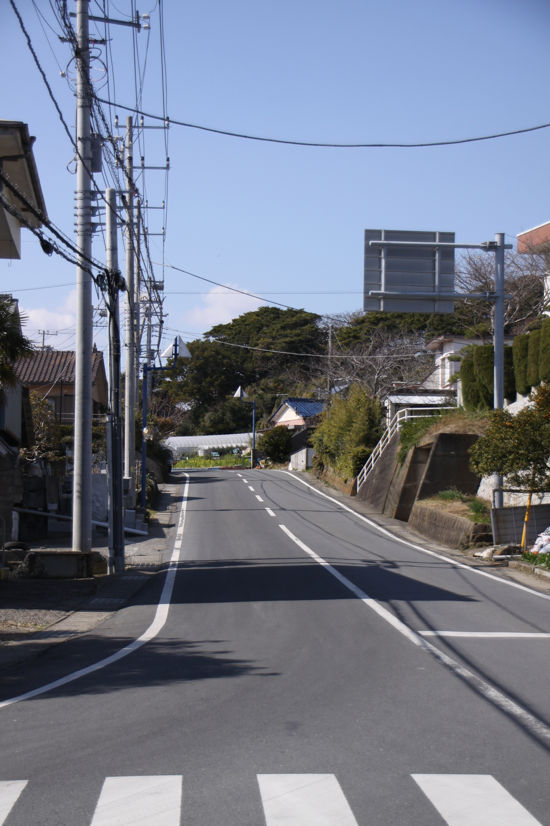 千葉県道89号鴨川富山線（鴨川市太海 起点）